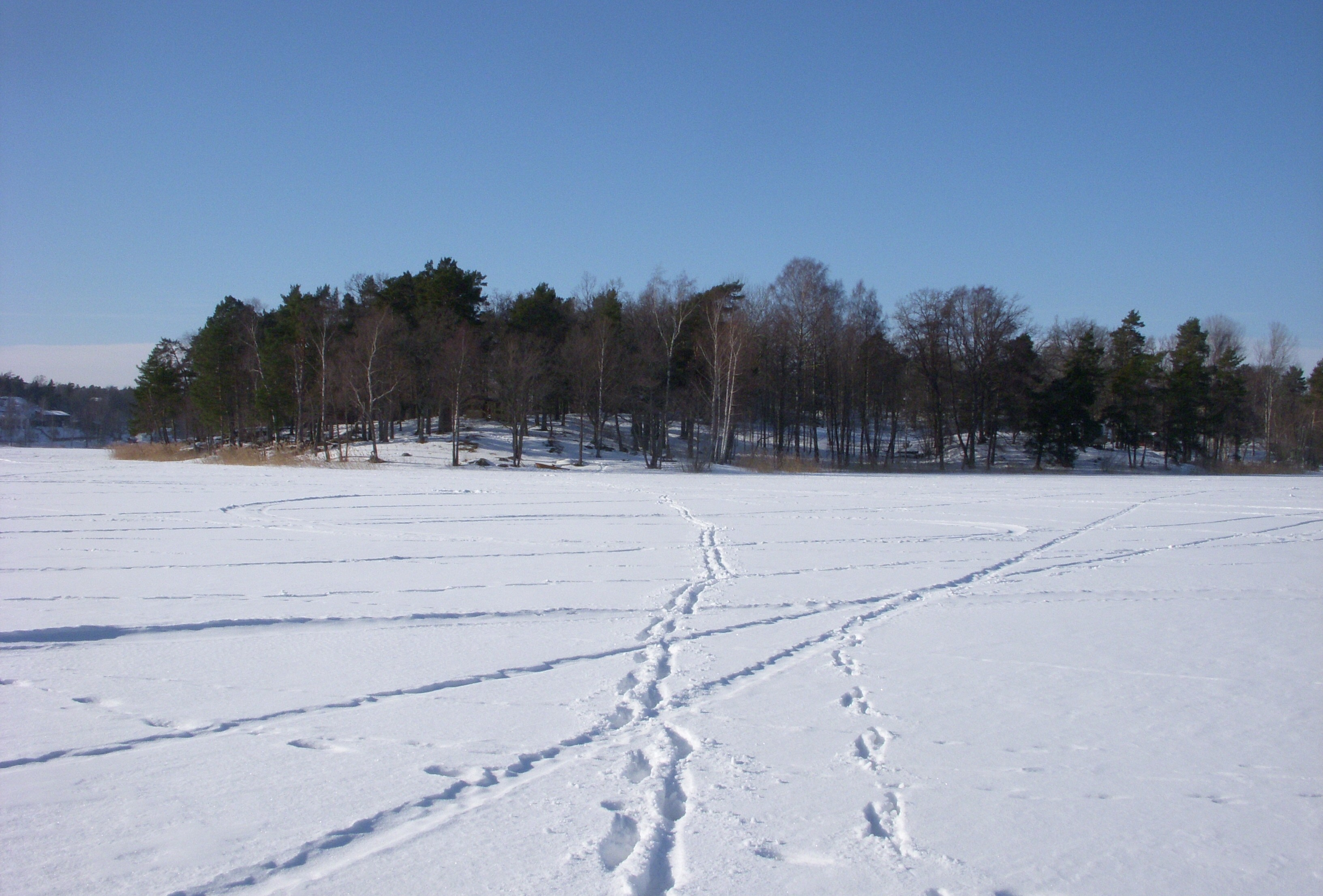 Farstanäset